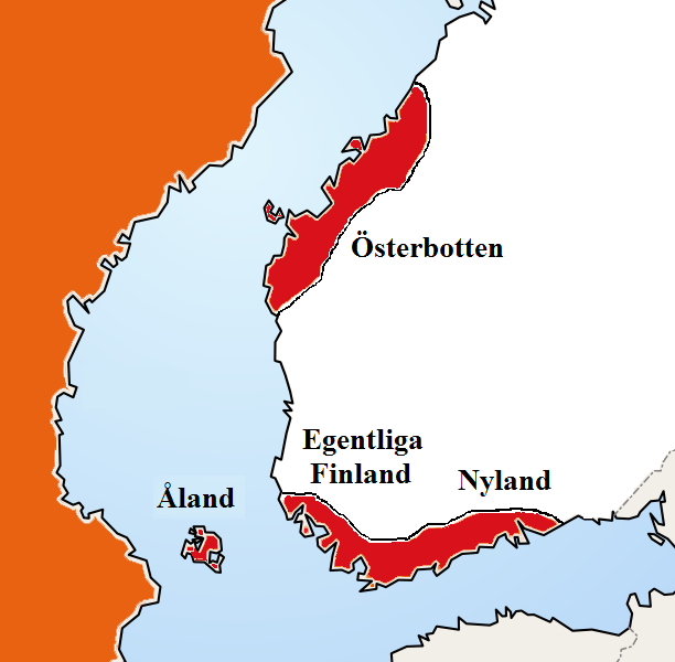 Karta över Svenskfinland, markerat i rött. Orange: andra svensktalande områden.